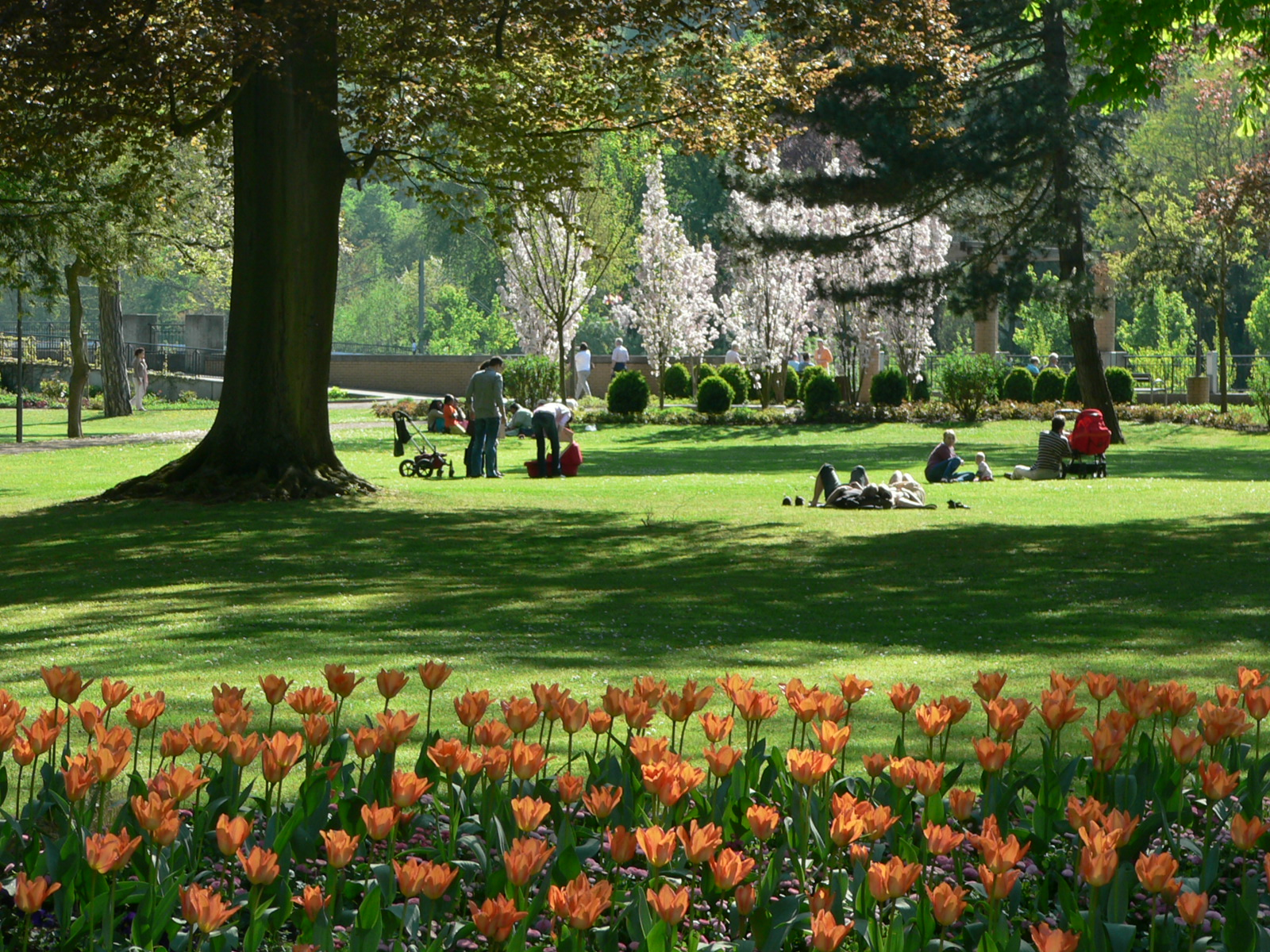 Englischer Garten im Kurpark Bad Kreuznach; Naturpark Soonwald-Nahe